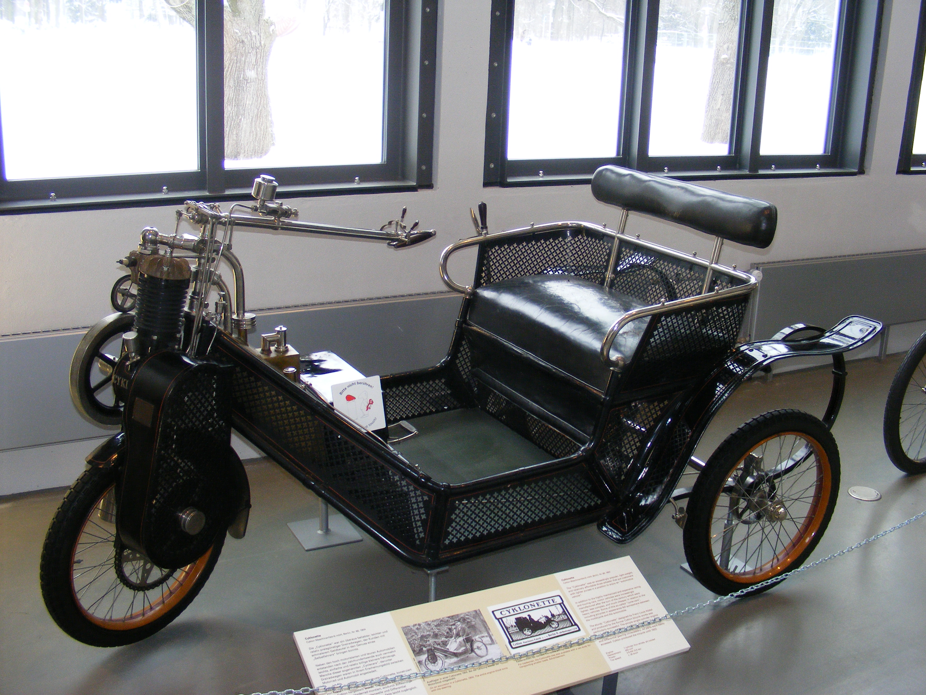 Cyklonette (Hersteller: Cyklon Maschinenfabrik m.b.H., Berlin Ost, Alt-Boxhagen), bei der Lenkung wurde der Motorblock mitgedreht — Exponat im Deutschen Museum Verkehrszentrum München